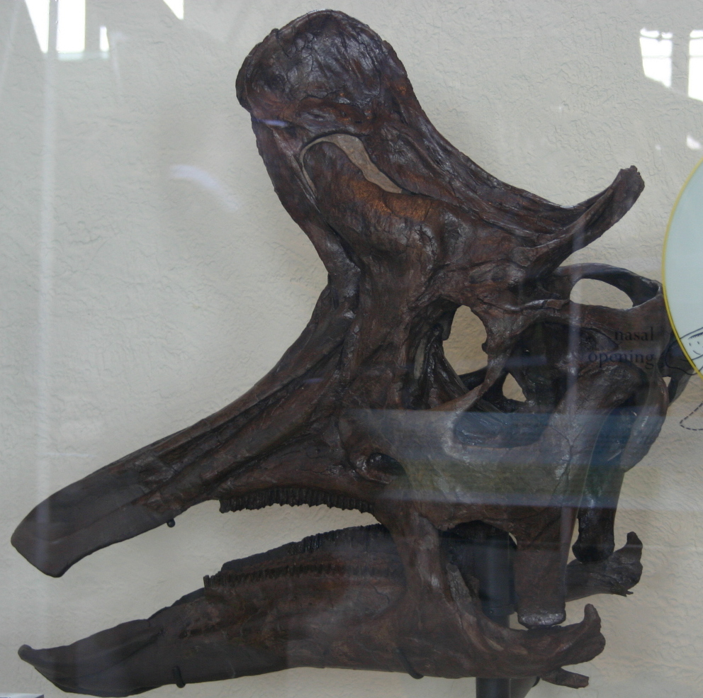 Lambeosaurus lambei specimen AMNH 5353. Visit my blog at